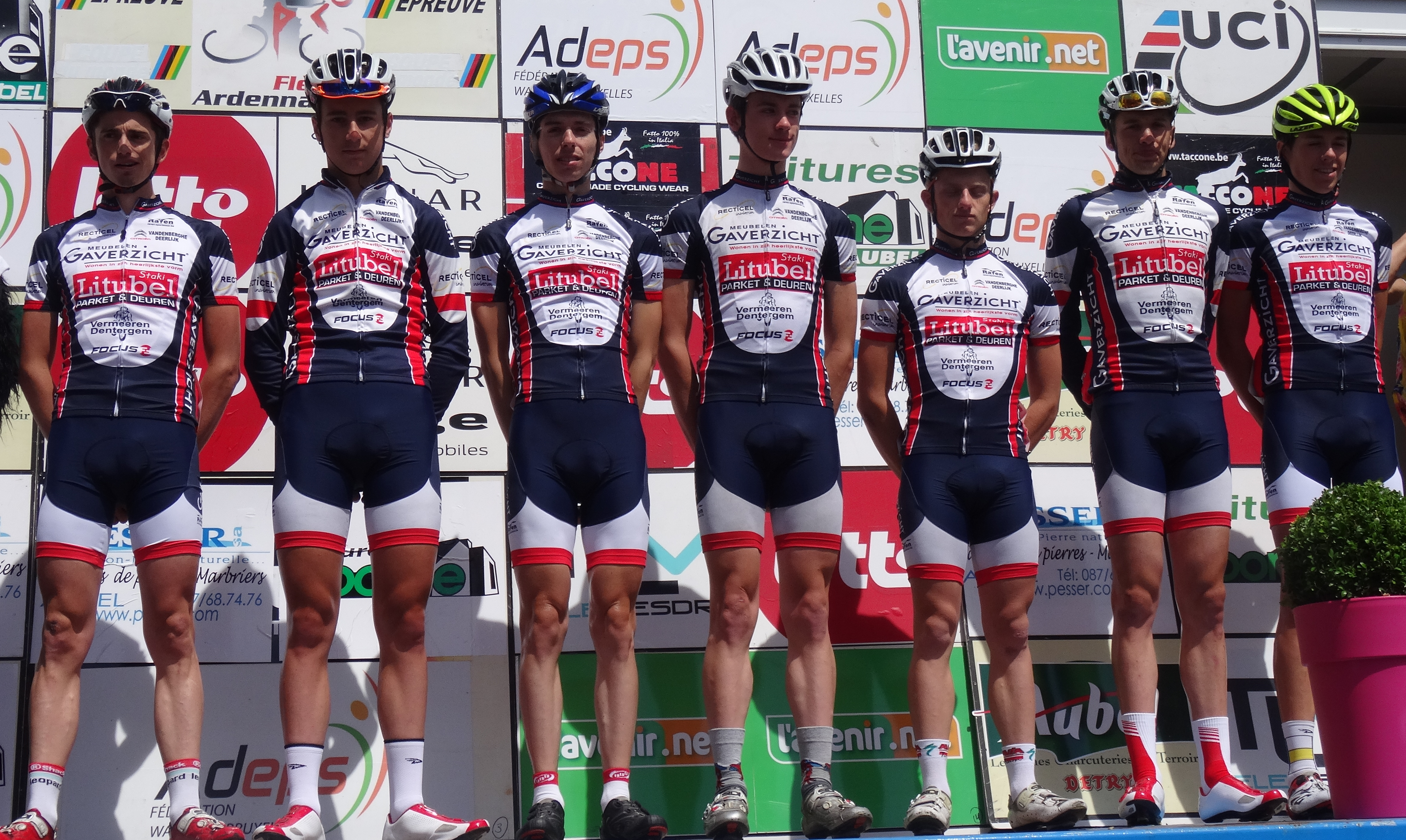 Reportage photographique réalisé le dimanche 22 juin à l'occasion du départ et de l'arrivée de la Flèche ardennaise 2014 à Herve, Belgique.